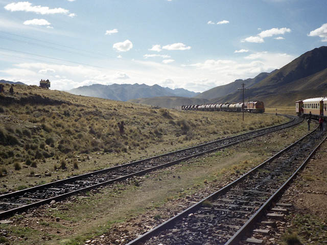 Ferrocarril en altiplano entre Cuzco y Puno de peru. Foto por usario Inti-sol, octubre de 1989. ペルー、クスコ・プーノ間のアルティプラーノの鉄道。投稿者が1989年10月に撮影。